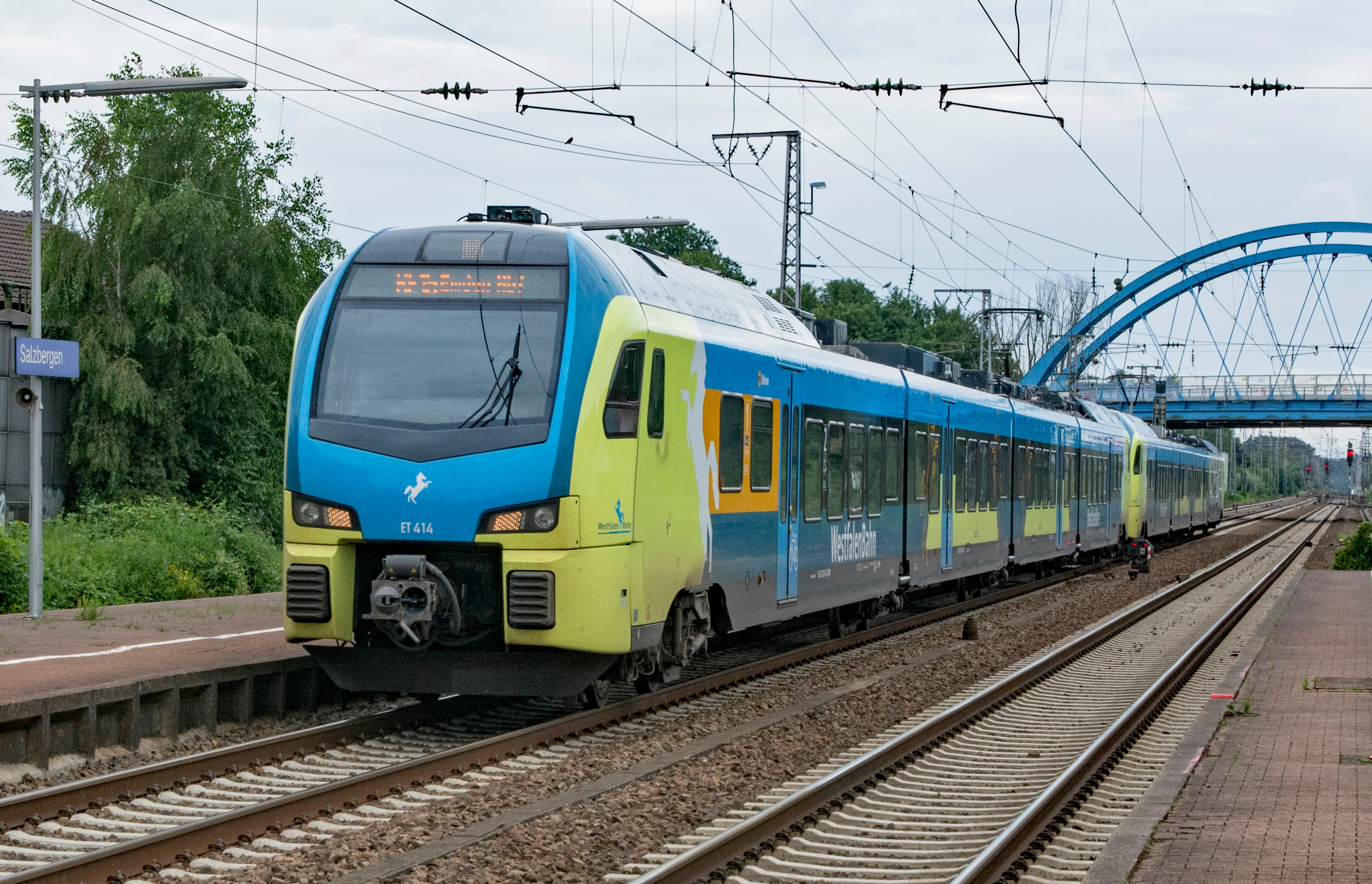 WestfalenBahn RE15 nach Emden Hbf in Salzbergen am 3. Juli 2016